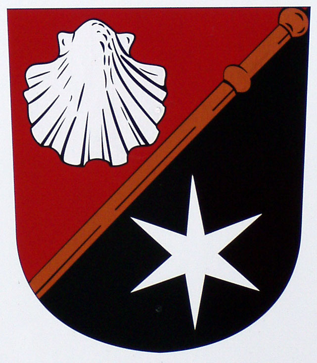 Ortswappen von Sickershausen (Kreisstadt Kitzingen, Bundesland Bayern